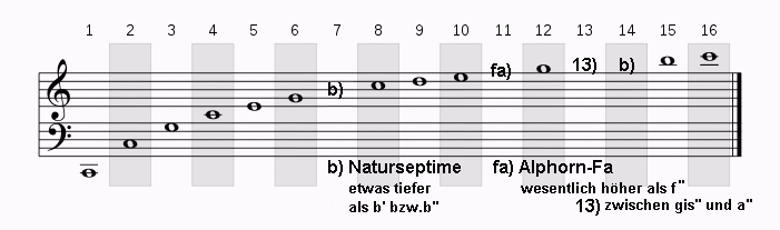 Naturtonreihe